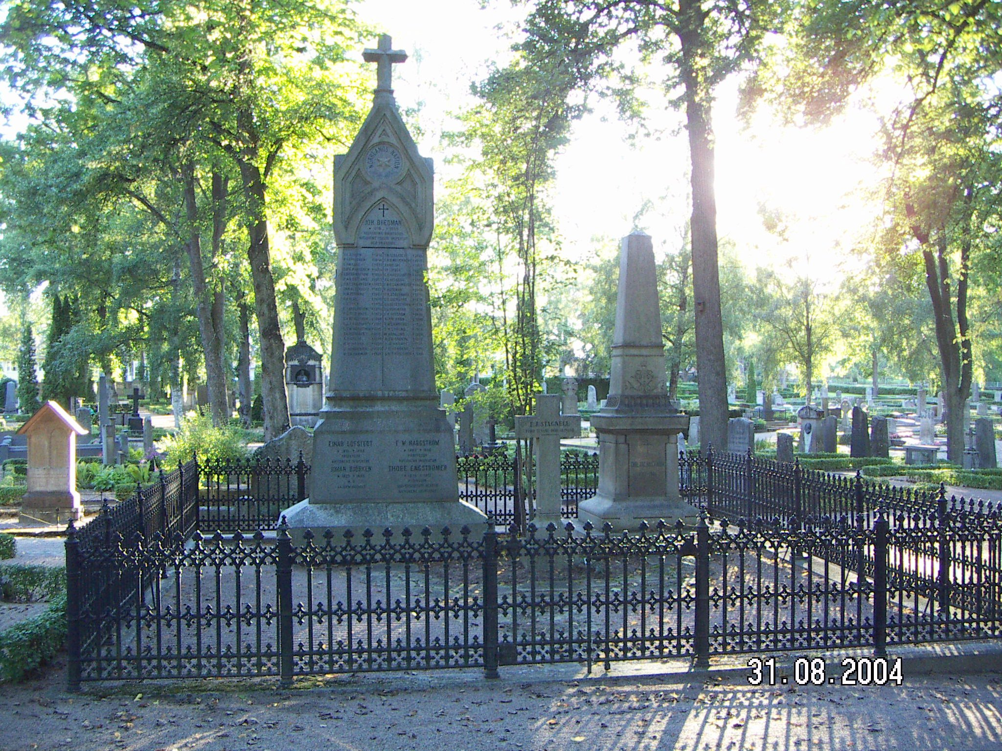 Norrlands nationsgrav på gamla kyrkogården i Uppsala.